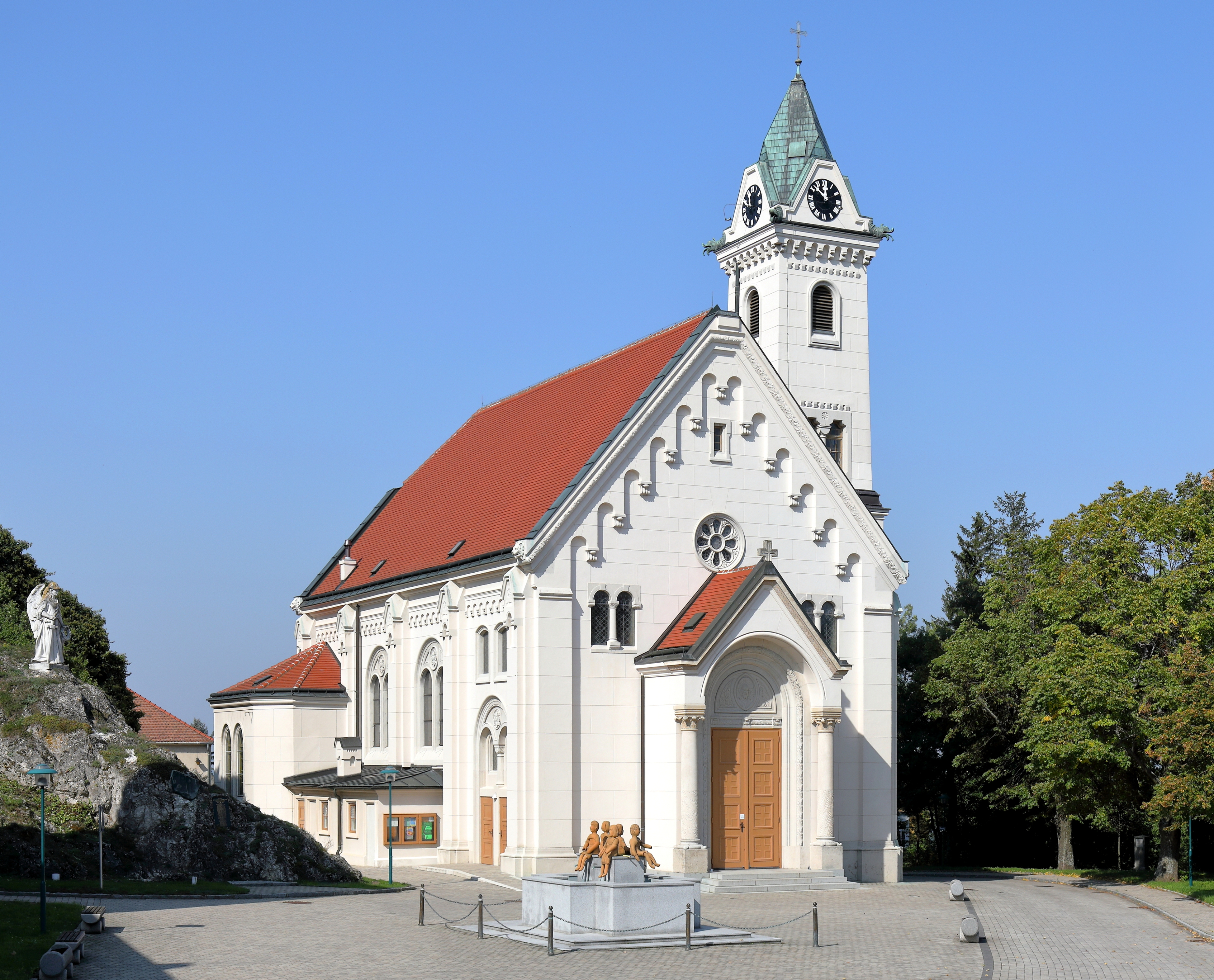 Südostansicht der röm.-kath. Pfarrkirche hl. Martin in der niederösterreichischen Marktgemeinde Staatz. Die neoromanische Kirche am Fuß der Staatzer Klippe wurde an Stelle einer älteren Kirche nach Plänen des Architekten Viktor Siedek erbaut und 1907 geweiht.